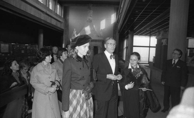 Staatsbesuch König Hussein II. und Königin Nur Al-Hussein in der Bundesrepublik Deutschland. (7.11.78) Köln: Königin Nur Al-Hussein besichtigt das Römisch-Germanische Museum.